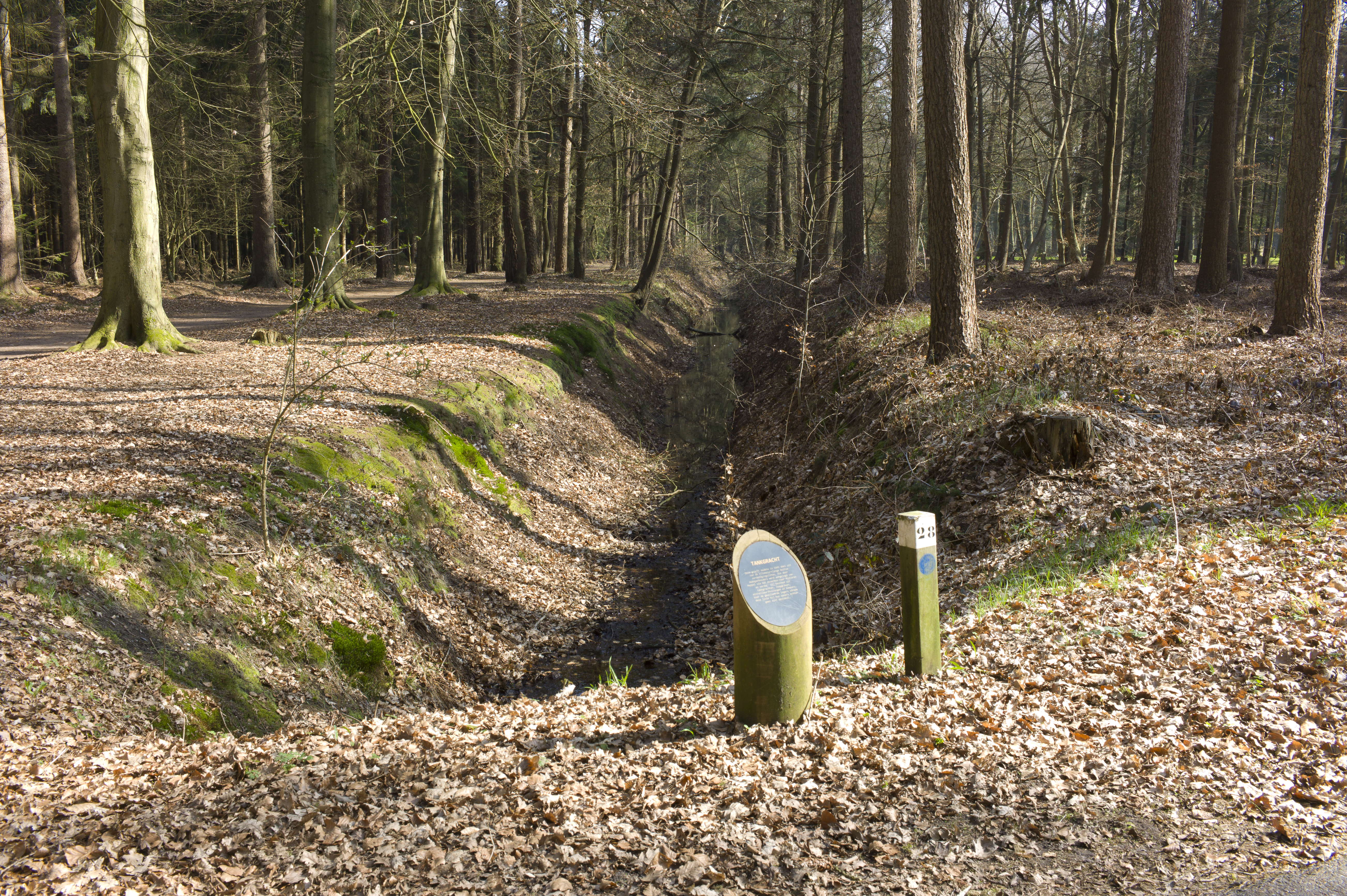 Tankgracht in Assen